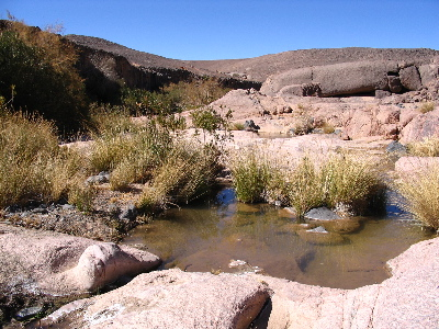 Algérie